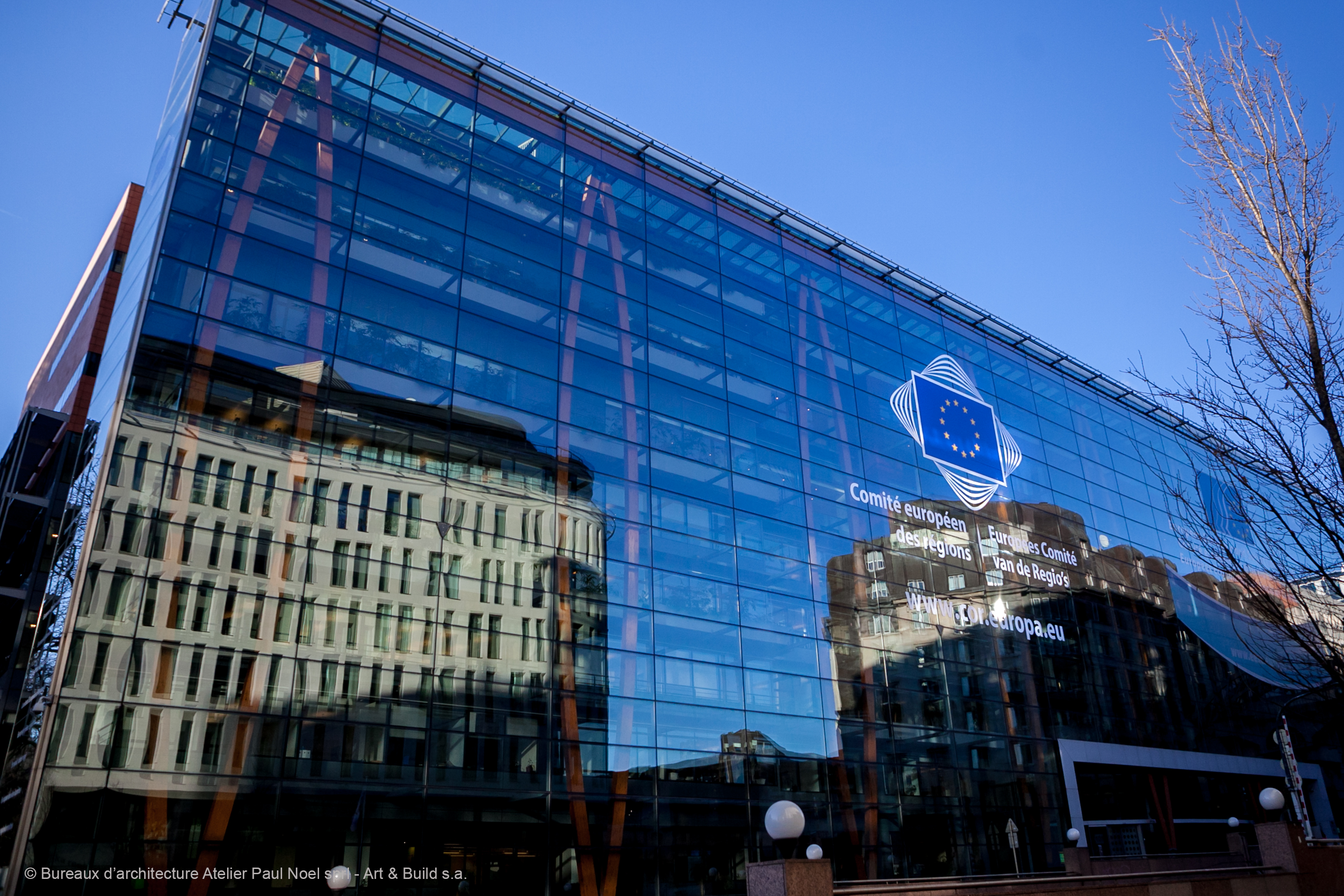 Sídlo Evropského výboru regionů v Bruselu